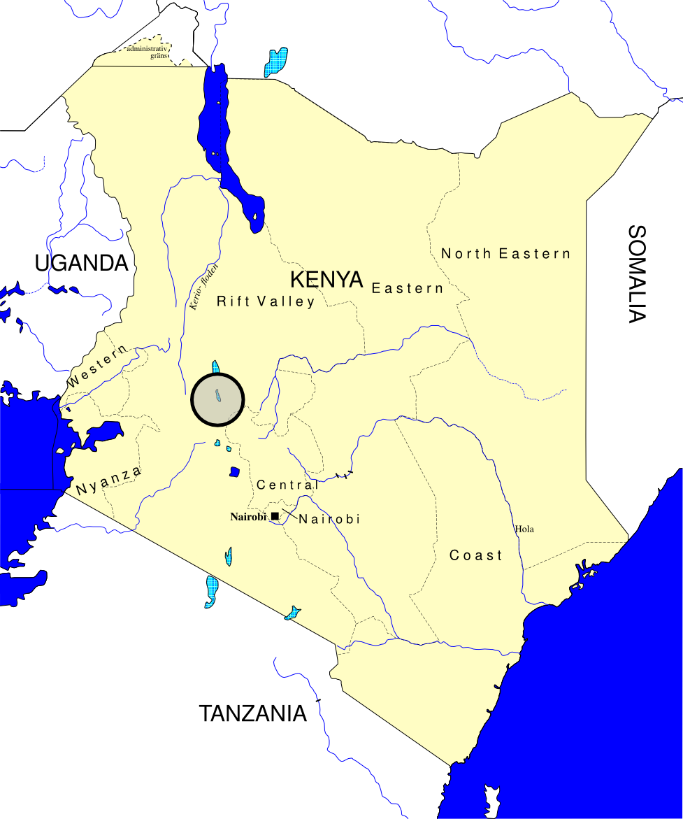 Bogoriasjöns läge i Kenya